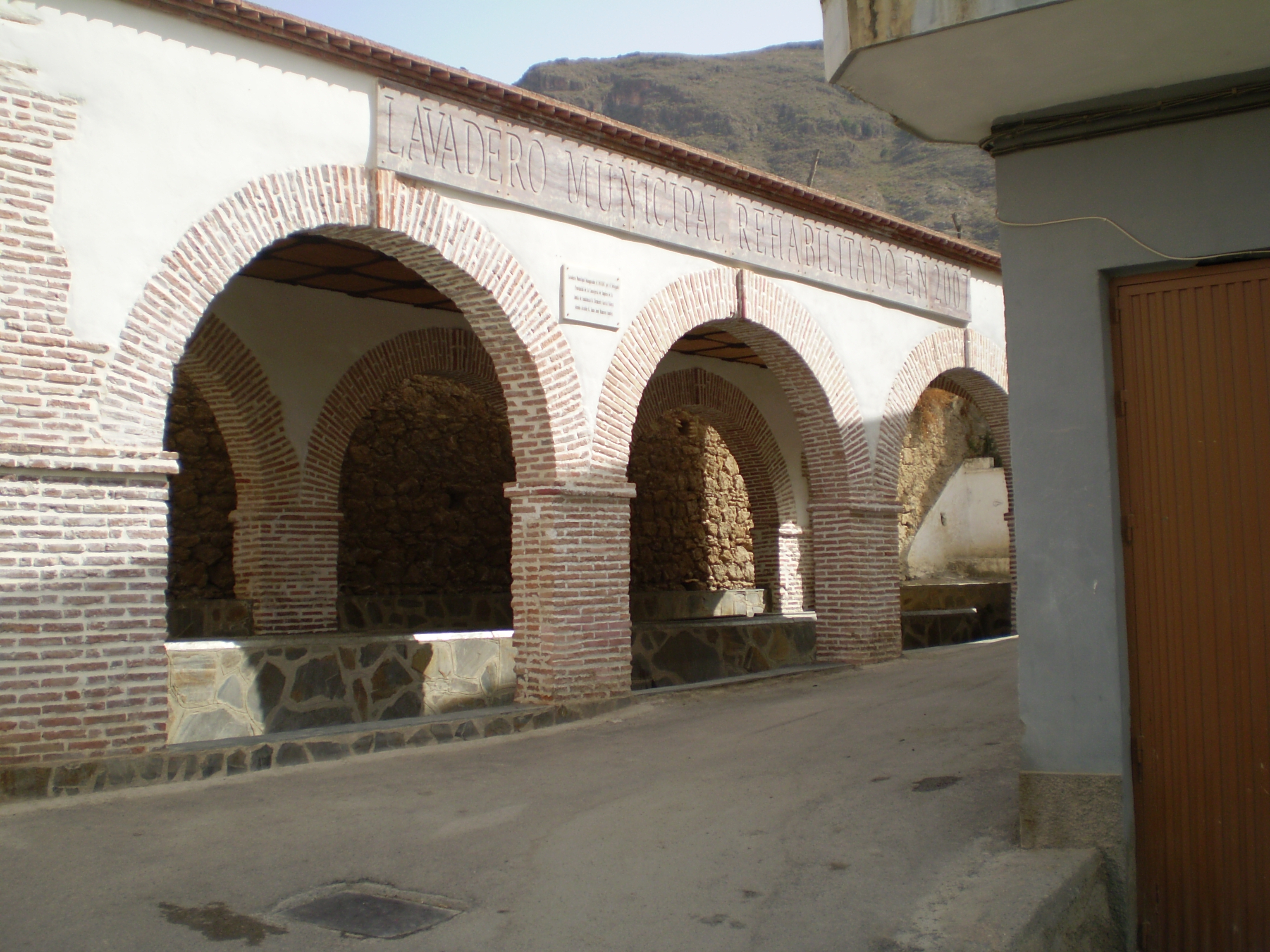 Lavadero público de Huécija (Almería-España)